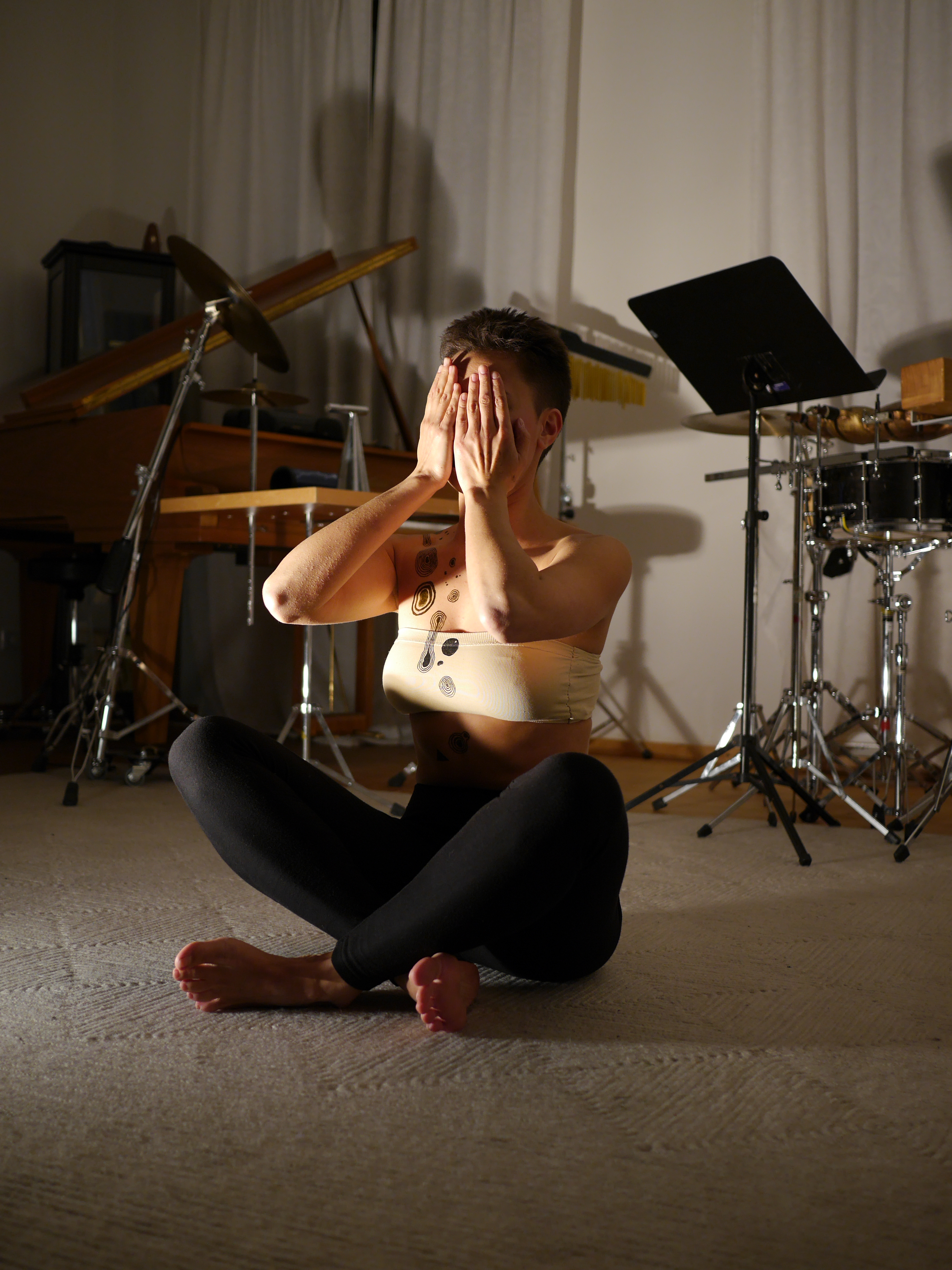 6. Hörfest Neue Musik (Epilog) 02.10.2015 Klangwerkstatt, Detmold (Germany). „? Corporel“ (Vinko Globokar) Malika Maminova